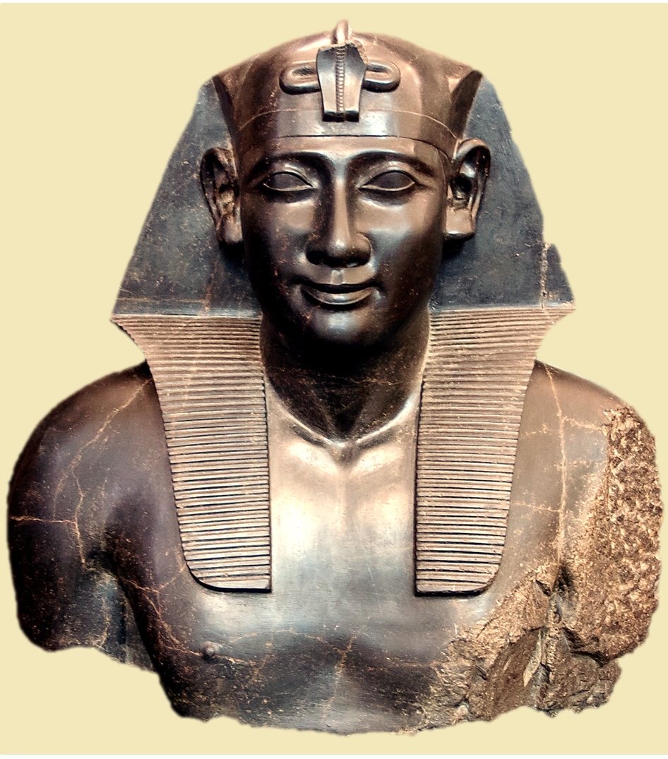 Tolomeo I. - Soter. Immagine originale: British Museum Egypt 031.jpg